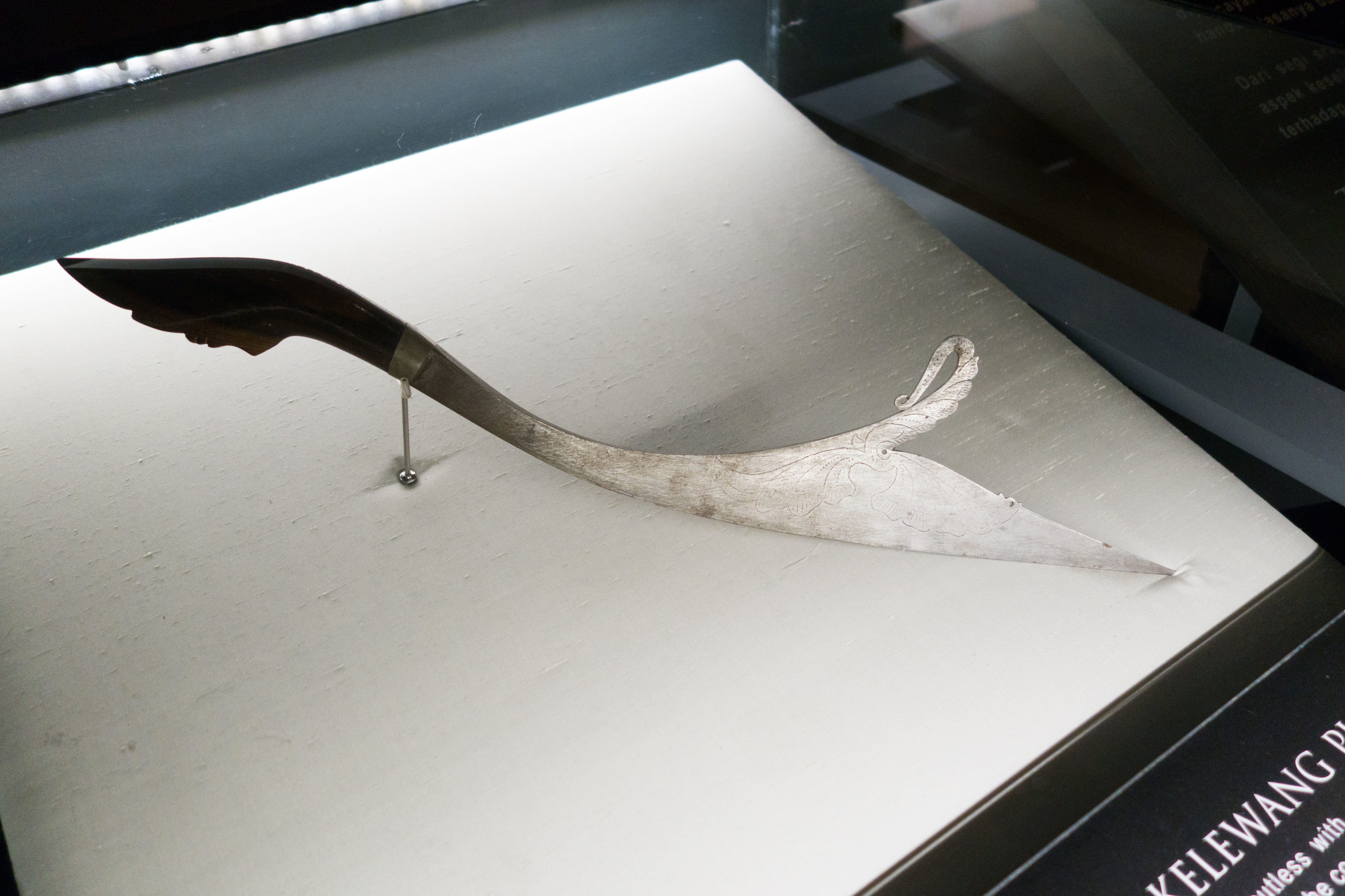 Kelewang Pucuk BerkaitKuala Lumpur, Malaysia, National Museum Negara, 2015